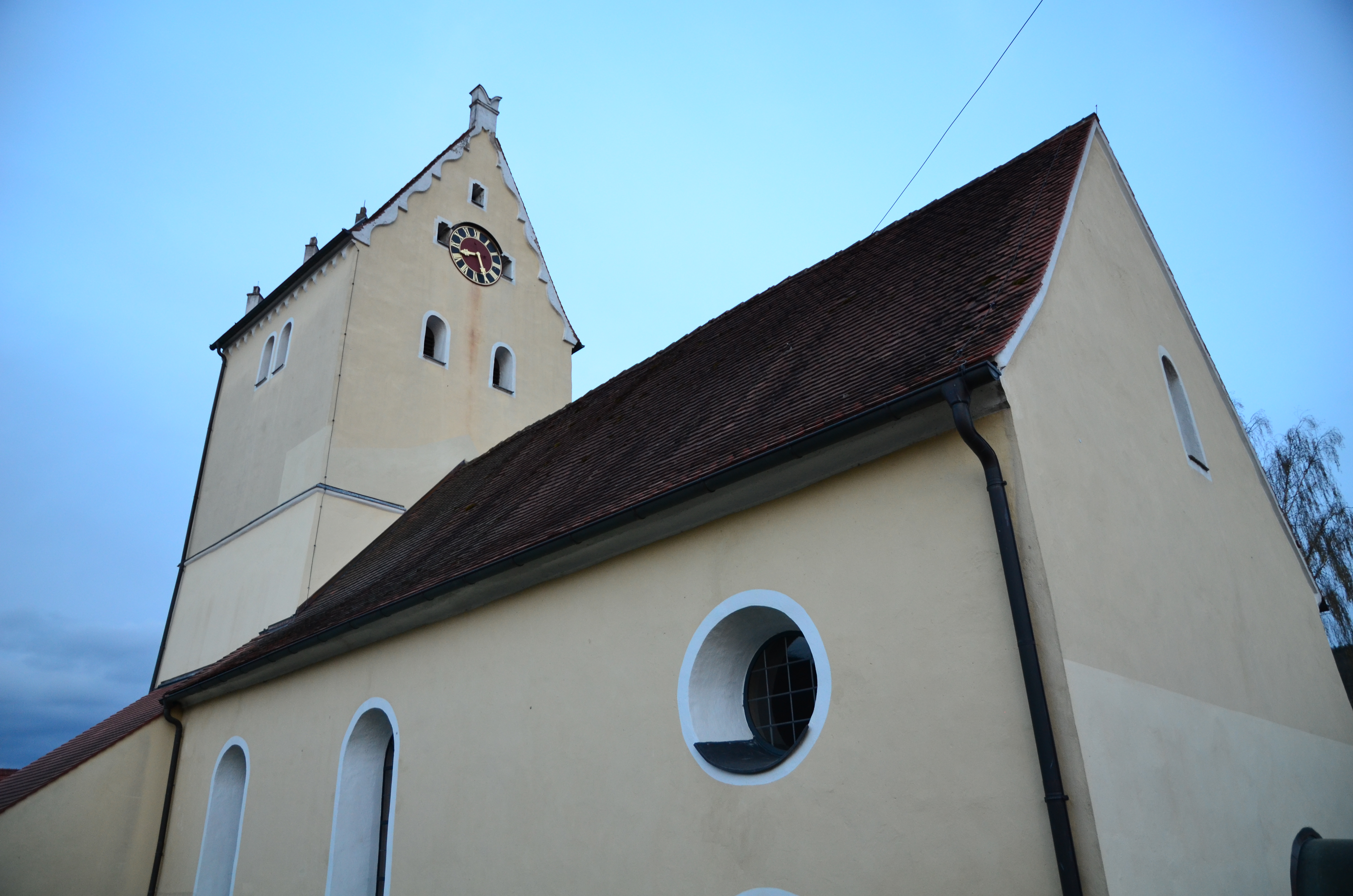 evang-luth. Kirche St. Nikolaus in Untermagerbein